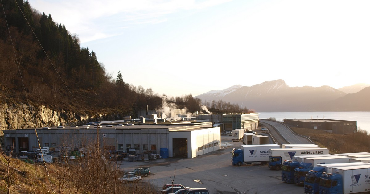 Bygningane til Vartdal Plastindustri, Ørsta